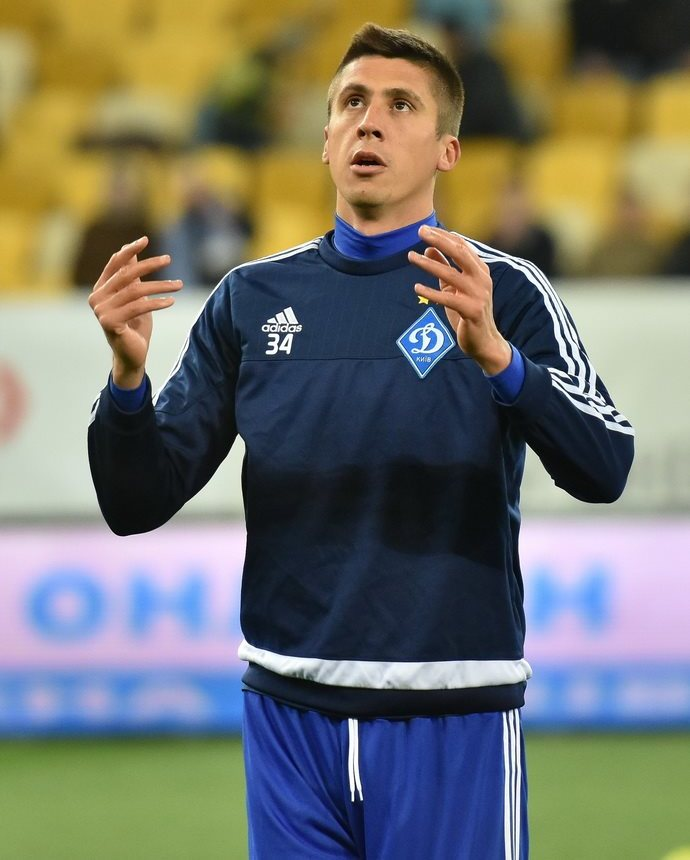 Євген Хачеріді - футболіст Динамо (Київ)